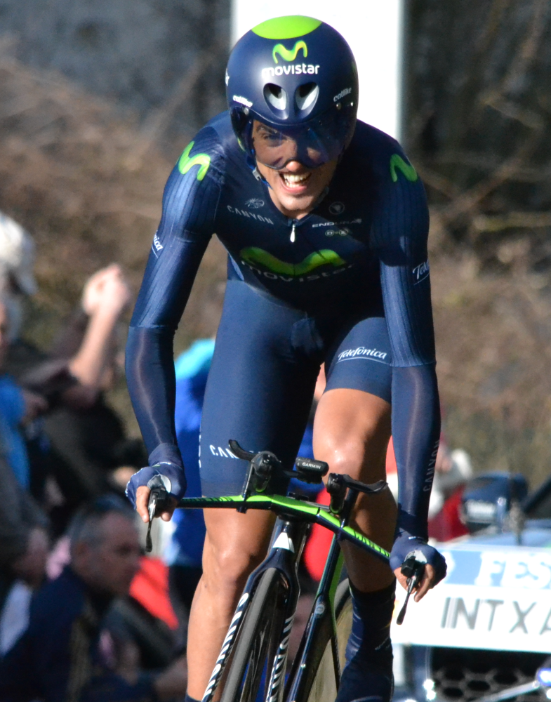 Paris-Nice 2015